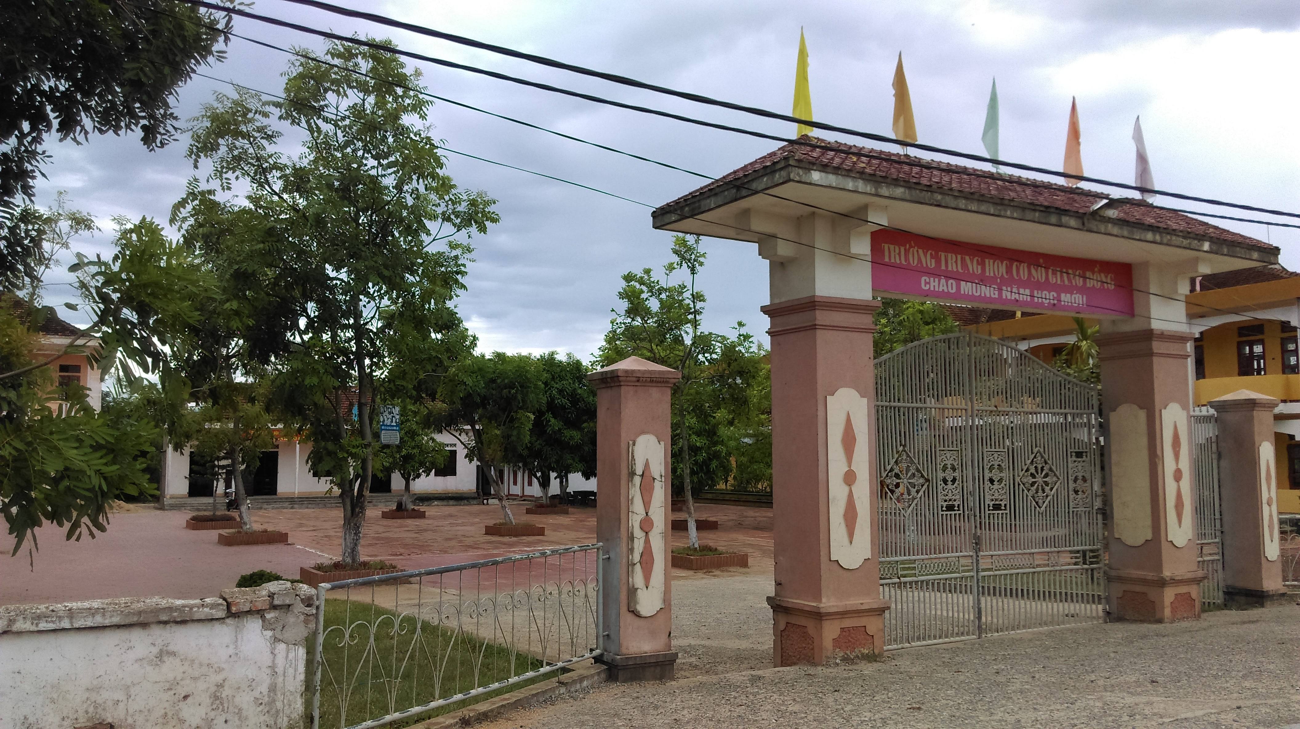 Trường THCS Giang Đồng, Kỳ Giang, Kỳ Anh, Hà Tĩnh